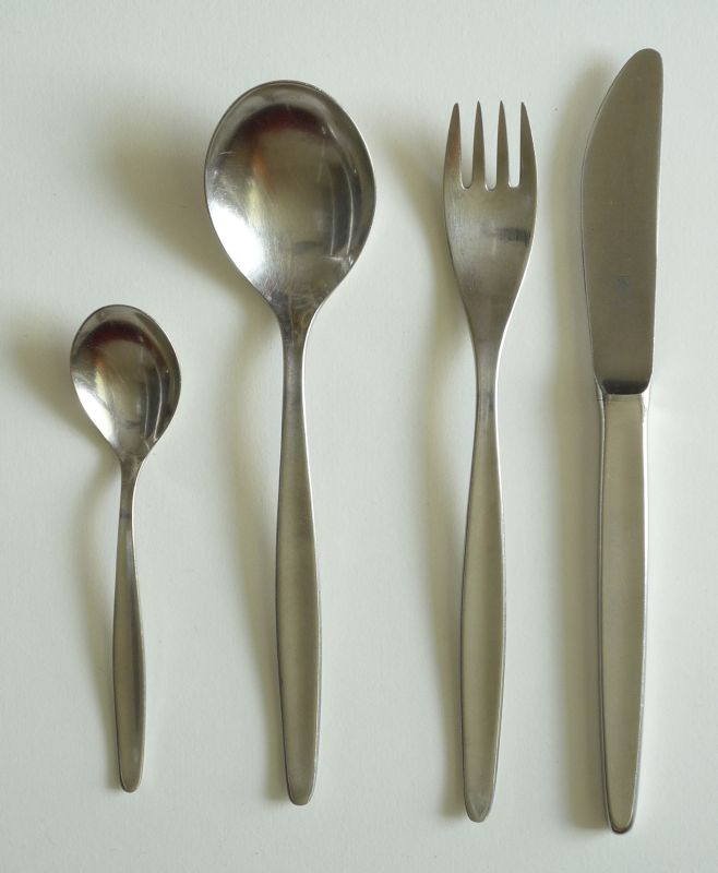 WMF-Besteck "Stockholm" (ca. 1960er Jahre)